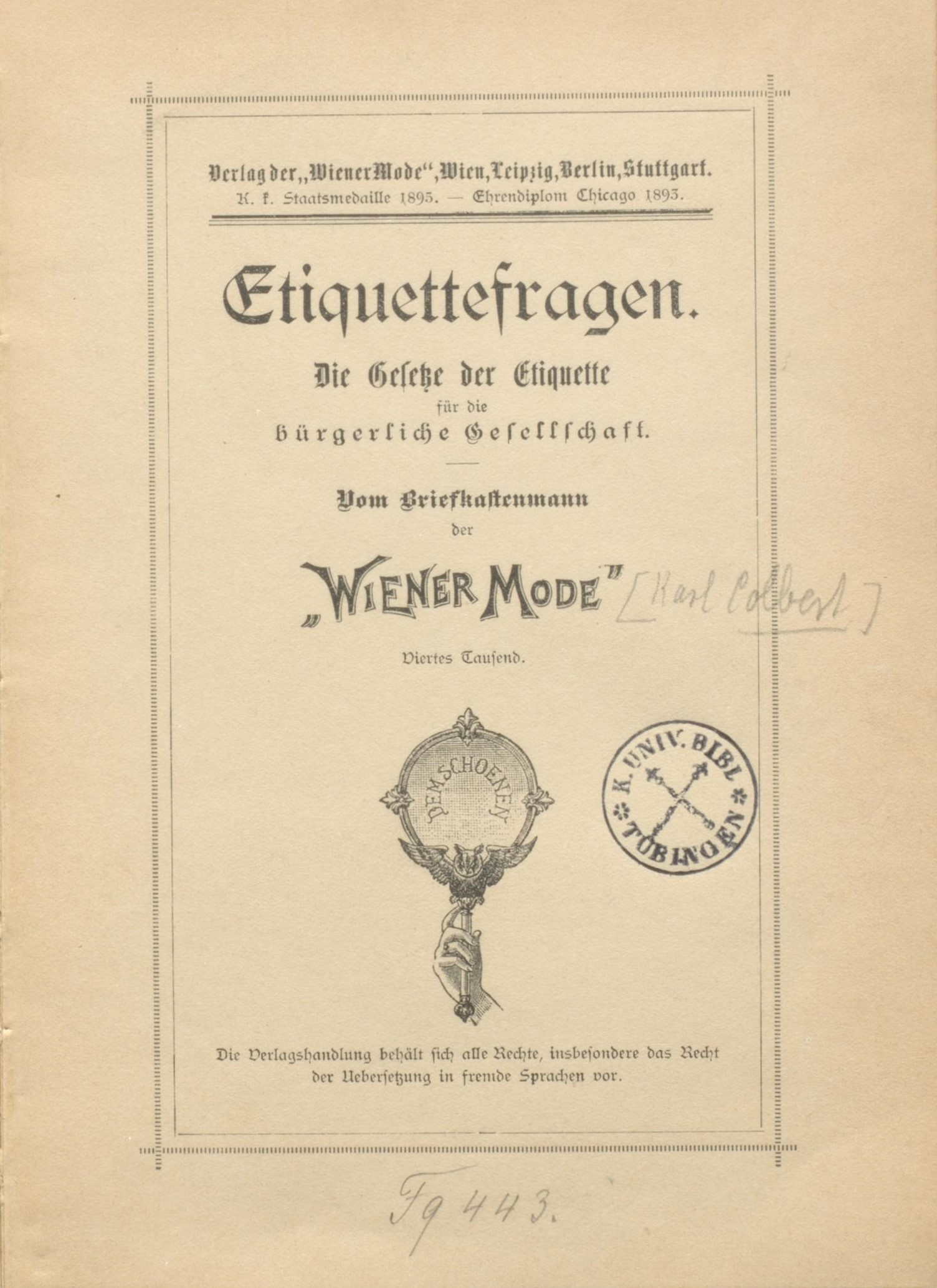 anonym, das ist Karl Colbert : Etiquettefragen, Wien 1895